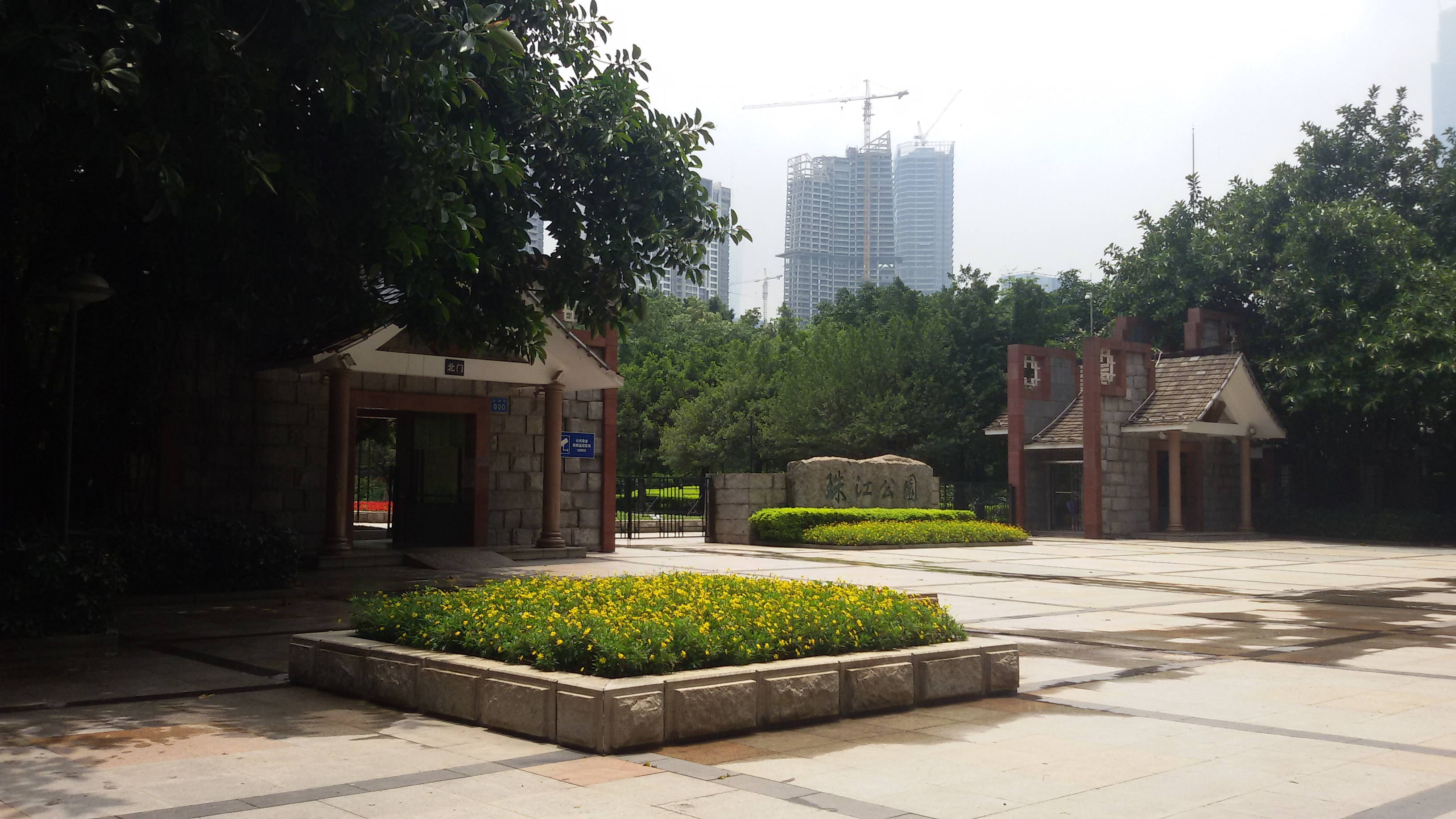 粵語: 广州珠江公园（北门）